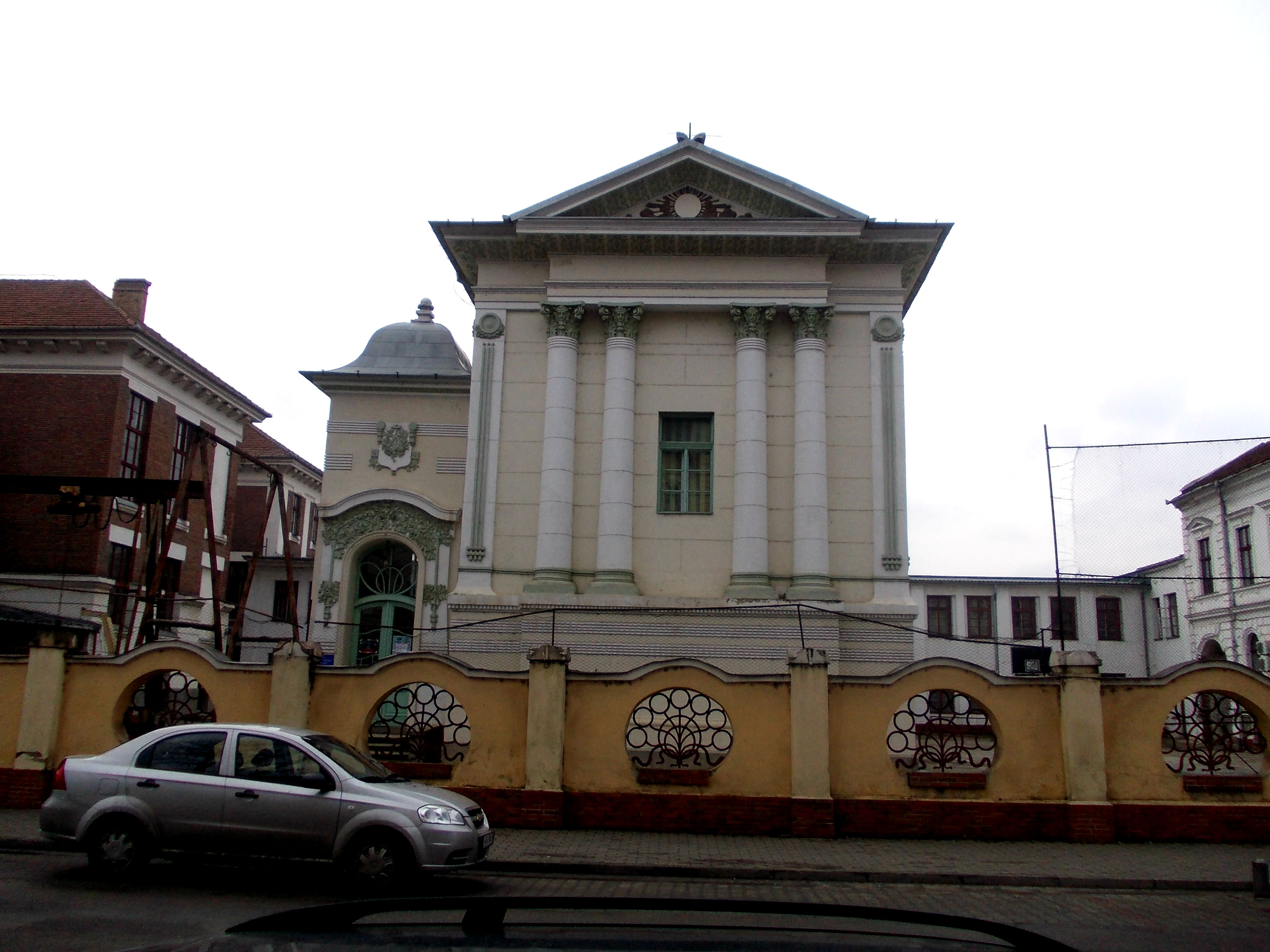 Fostul Templu al Lojii Masonice Concordia, azi corp al Grupului Școlar Industrial „Aurel Vlaicu”